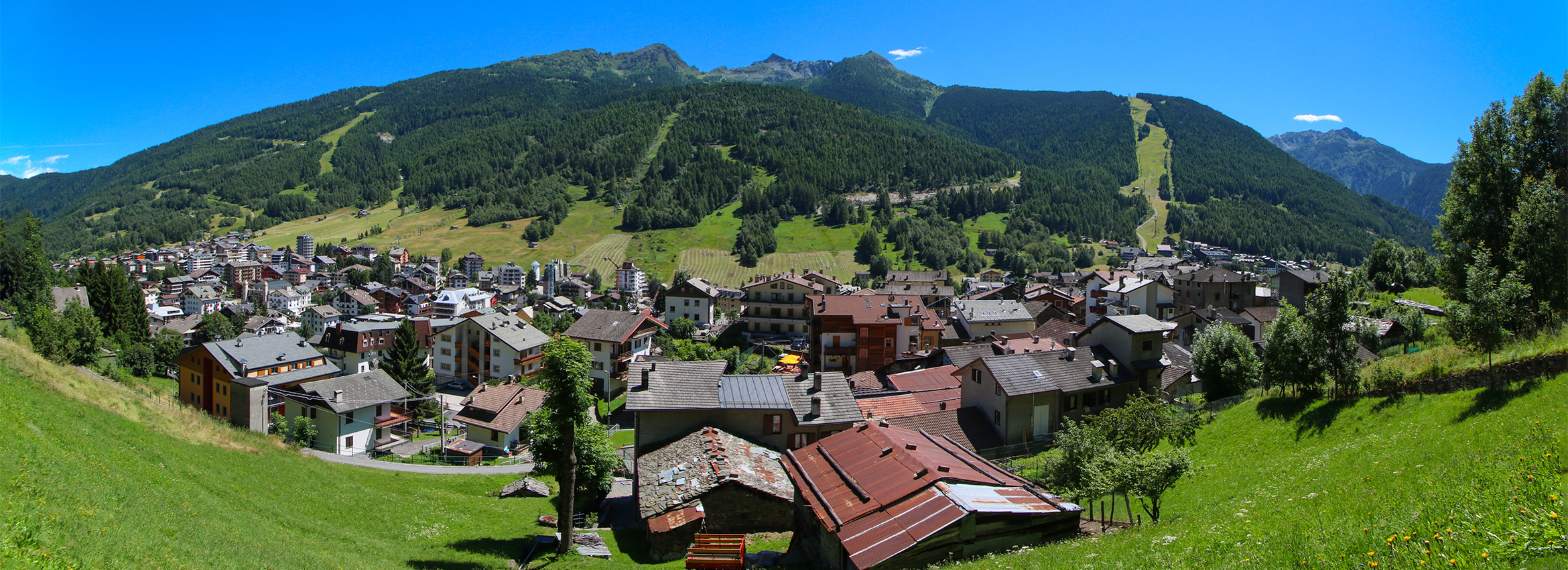 Foto Panoramica di Aprica dal Dosso